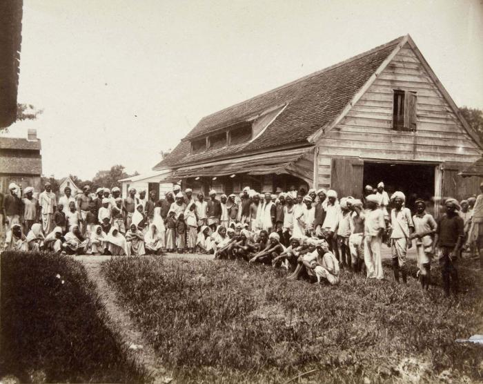 Foto. Brits-Indische immigranten in het koeliedepot. Na aankomst verbleven de contractarbeiders eerst in het depot waar ze medisch werden gekeurd en van de nodige papieren werden voorzien. Daarna kregen ze te horen op welke plantage ze gedurende de contractperiode van vijf jaar gingen werken.. Brits-Indische immigranten in het koeliedepot in de wijk Combé, waar de contractarbeiders na aankomst voor de nodige keuringen en papieren verbleven